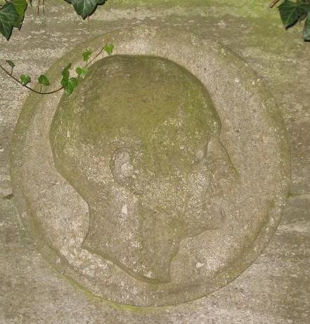 Georg von Arco, ehemaliger Reliefgrabstein des 2011 entwidmeten Ehrengrabes auf dem Südwestkirchhof Stahnsdorf Märkische Allgemeine vom 12./13. Februar 2011, S. 21: Südwestkirchhof verliert Ehrengrab.